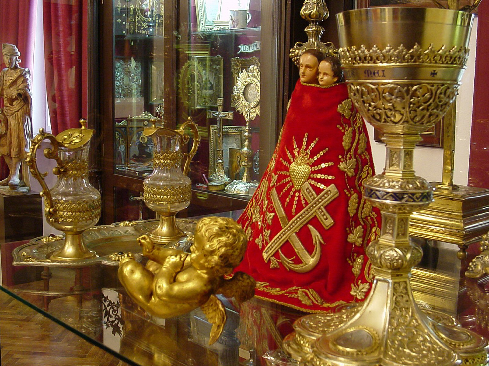 Fragment ekspozycji fot. Andrzej Sułkowski Muzeum Towarzystwa Jezusowego Prowincji Polski Południowej